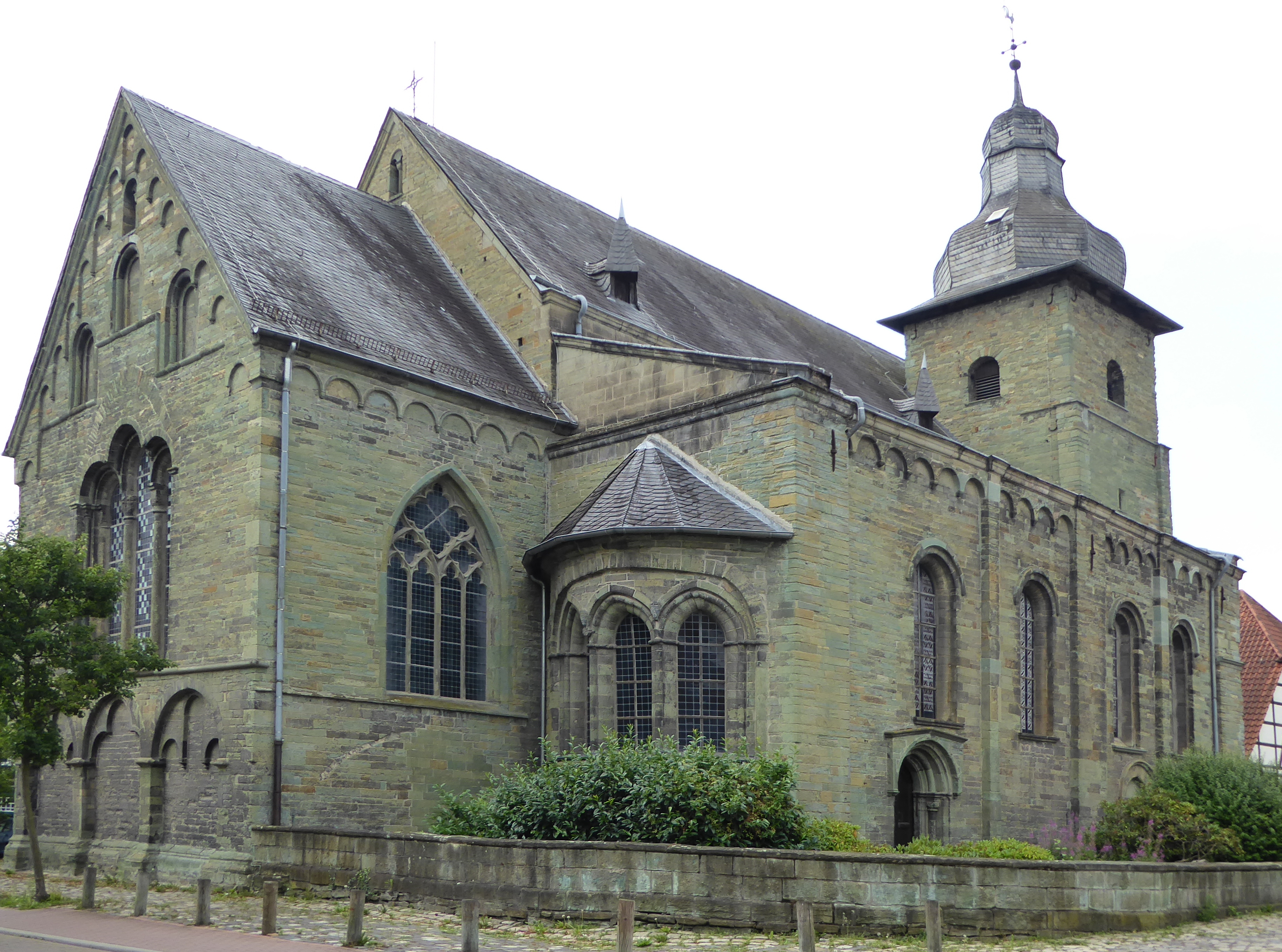 Soest, Maria zur Höhe, Ansicht von Nordosten (Lentzestraße)